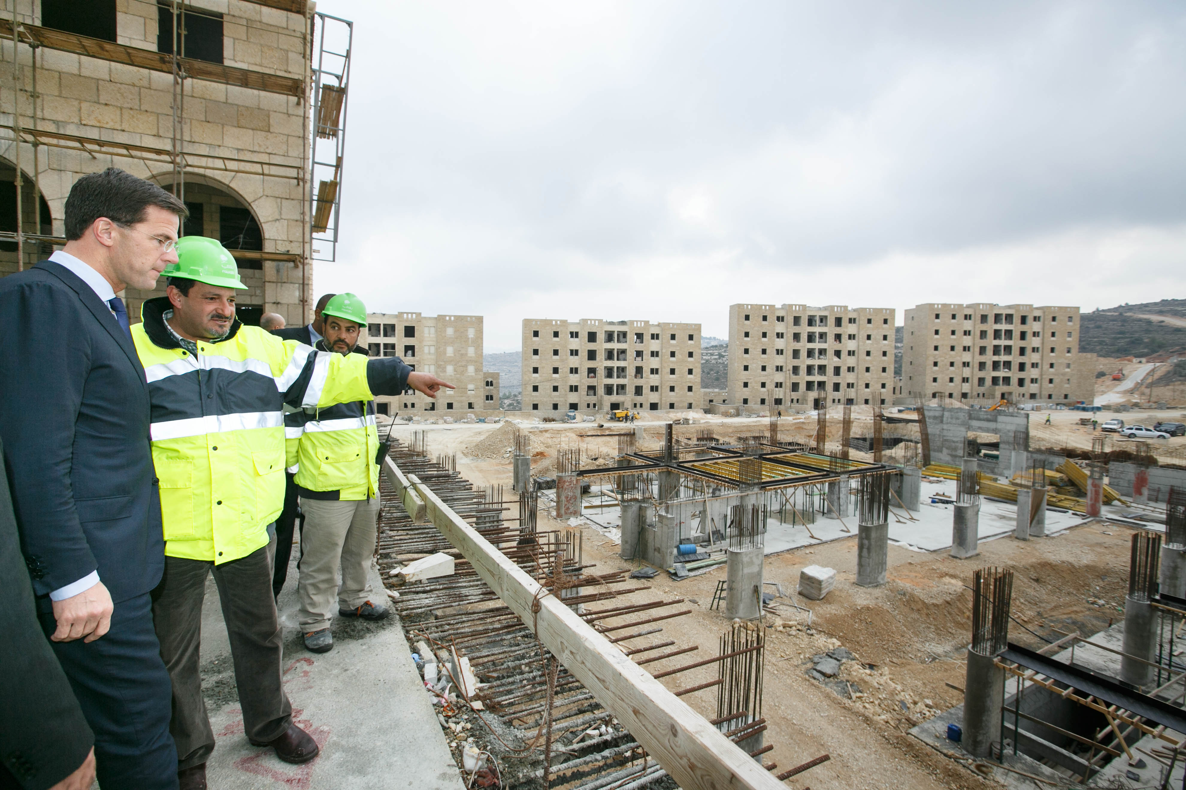 Premier Rutte tijdens zijn bezoek aan Rawabi. Rawabi is een nieuwe geplande stad op de westelijke Jordaanoever ten noorden van Ramallah. De Palestijnse zakenman Bashar Masri, de geestelijk vader achter de realisatie van deze moderne, groene high tech stad, is aanwezig bij het bezoek van de minister-president. Rutte bezoekt Israël en de Palestijnse Gebieden voor de officiële start van de bilaterale samenwerkingsfora met Israël en met de Palestijnse Gebieden. Hij wordt hierbij vergezeld door minister Timmermans van Buitenlandse Zaken en minister Ploumen voor Buitenlandse Handel en Ontwikkelingssamenwerking. Met de delegatie reist ook een handelsdelegatie mee onder aanvoering van VNO/NCW-voorzitter Bernard Wientjes met ongeveer 70 Nederlandse bedrijven en rond de 15 kennisinstellingen. Doel van de bilaterale samenwerkingsfora is het verder verstevigen van de goede betrekkingen met Israël en met de Palestijnse Gebieden. Overkoepelend thema is innovatie, met de nadruk op agro-food, energie/gas en water. Daarnaast wordt specifiek bij het samenwerkingsforum met de Palestijnse Gebieden het accent gelegd op ICT. Naast overheden zijn bedrijven, kennisinstellingen en niet-gouvernementele organisaties bij het Forum betrokken. Foto: Assaf Shilo